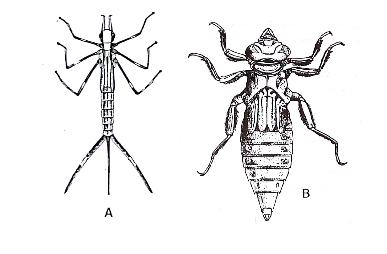 A. Ninfas de donzelinhas. As brânquias são as três estruturas foliáceas no final do abdômen. B. Ninfas de libélulas. Suas brânquias têm a forma de cristas no reto.